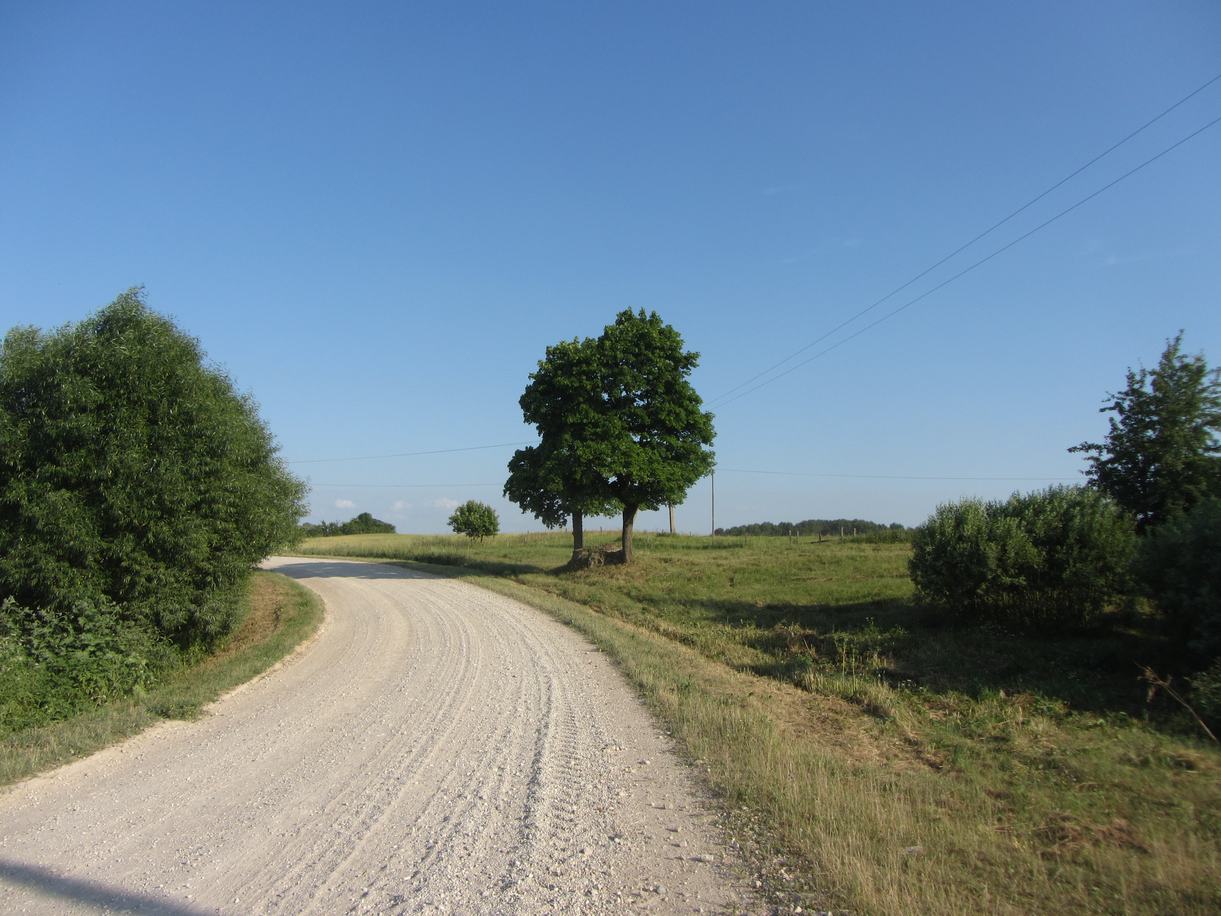 Skiemonių sen., Lithuania